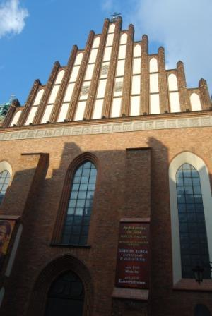 Świętojańska 8, 00-278 Warszawa